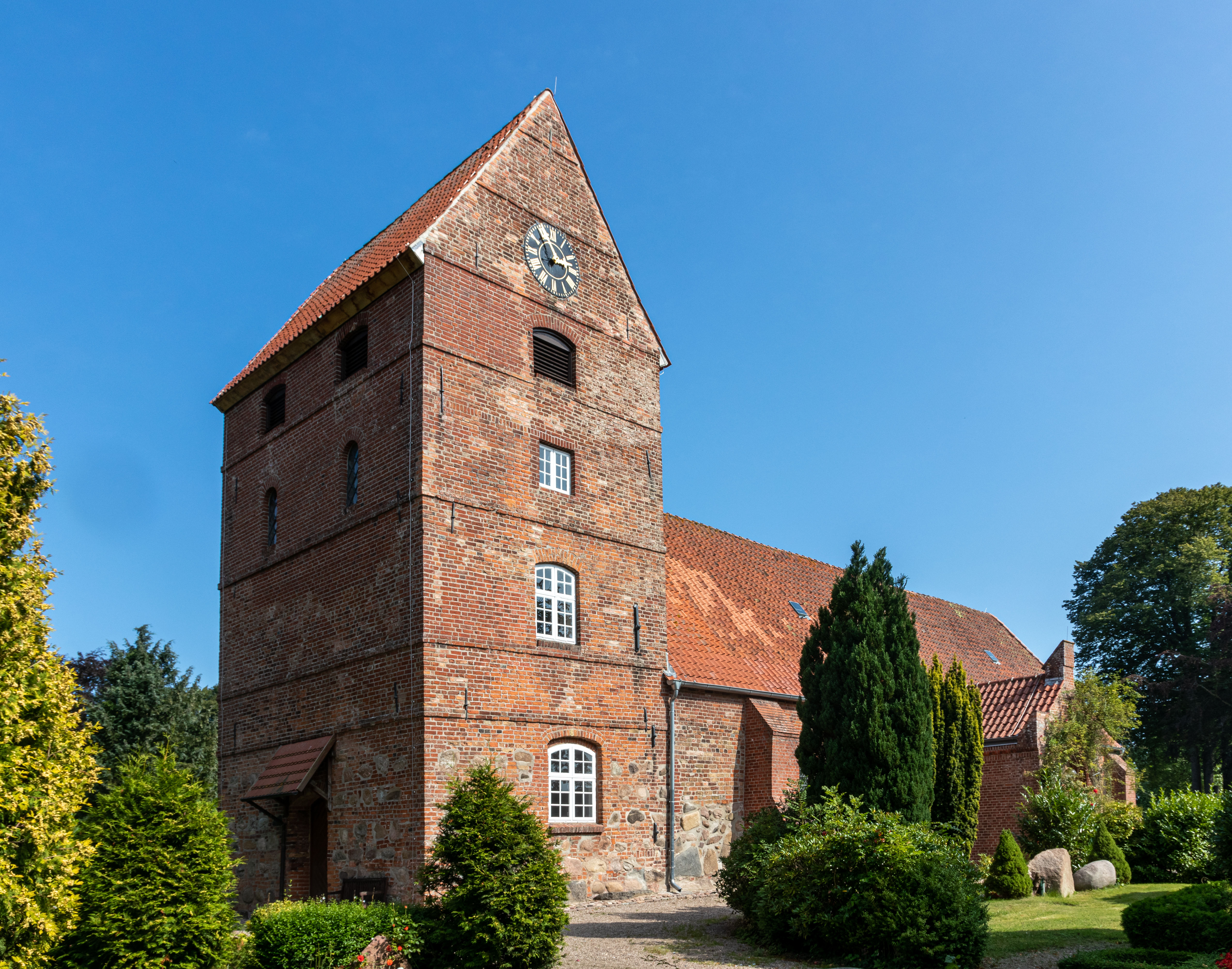 Die Kirche St. Marien in Klein-Waabs Marienkirche (Kleinwaabs)